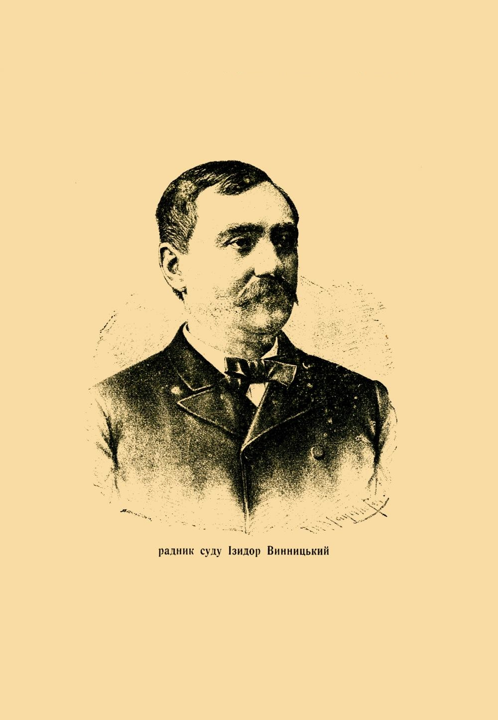 Сидір Винницький